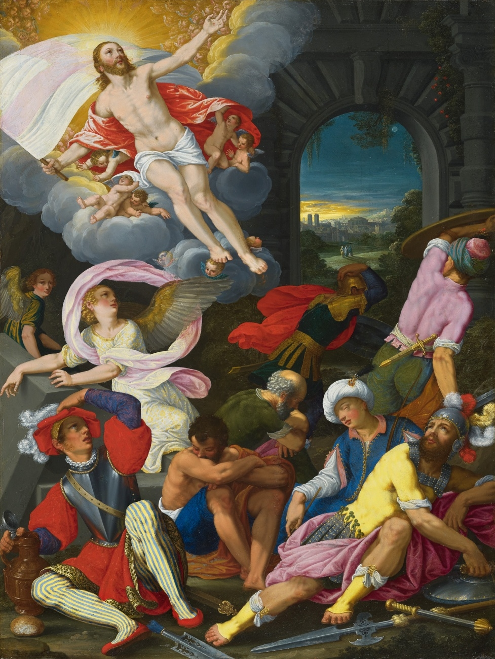 Himmelfahrt Christi. Öl auf Kupfer. 61,5 x 46 cm. Signiert und datiert unten links: Joha. König fc 1622